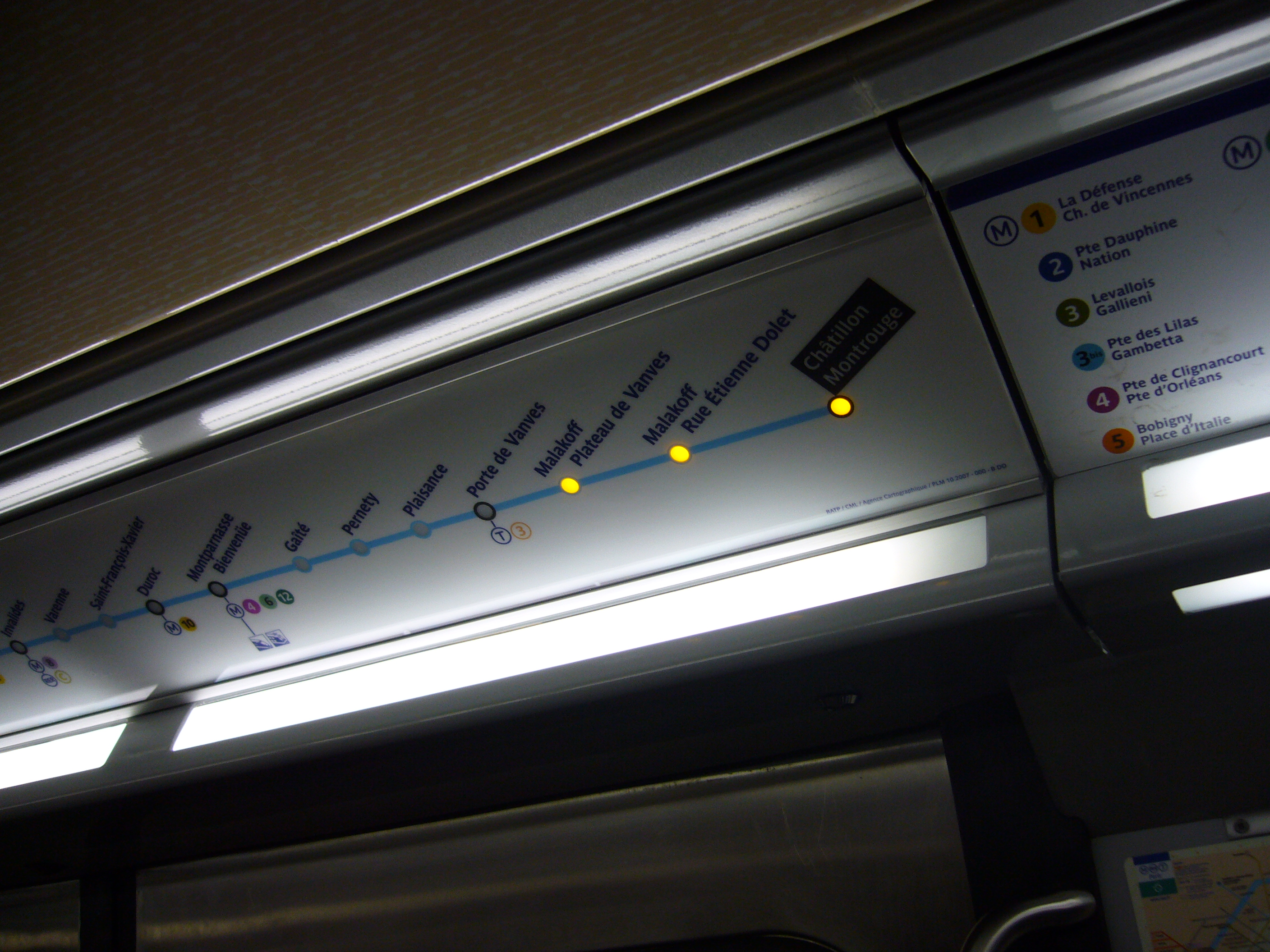 Vue du plan lumineux ASVA dans un MF 77 rénové sur la ligne 13 du métro de Paris.